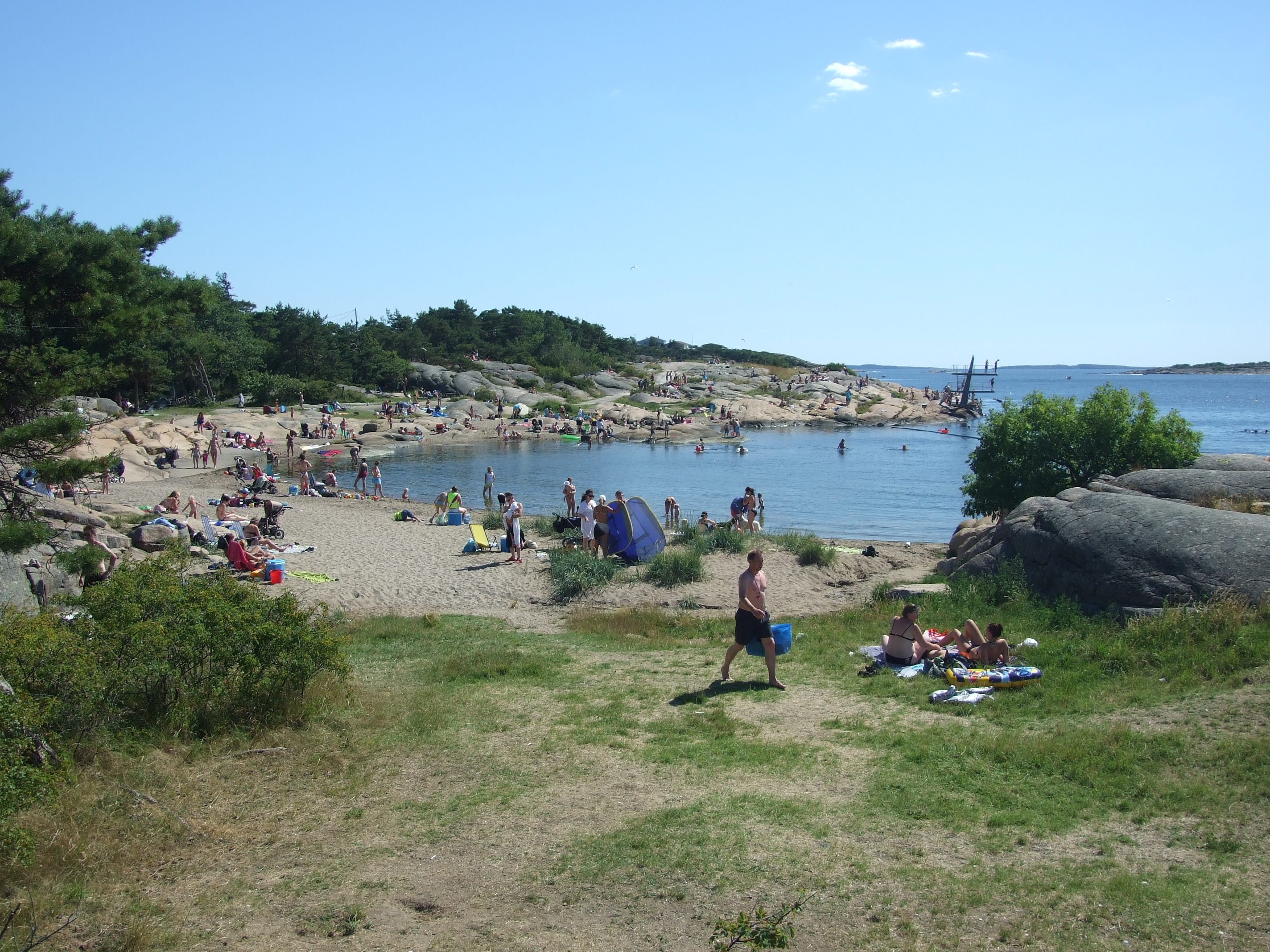 Badestedet Foten utenfor Fredrikstad